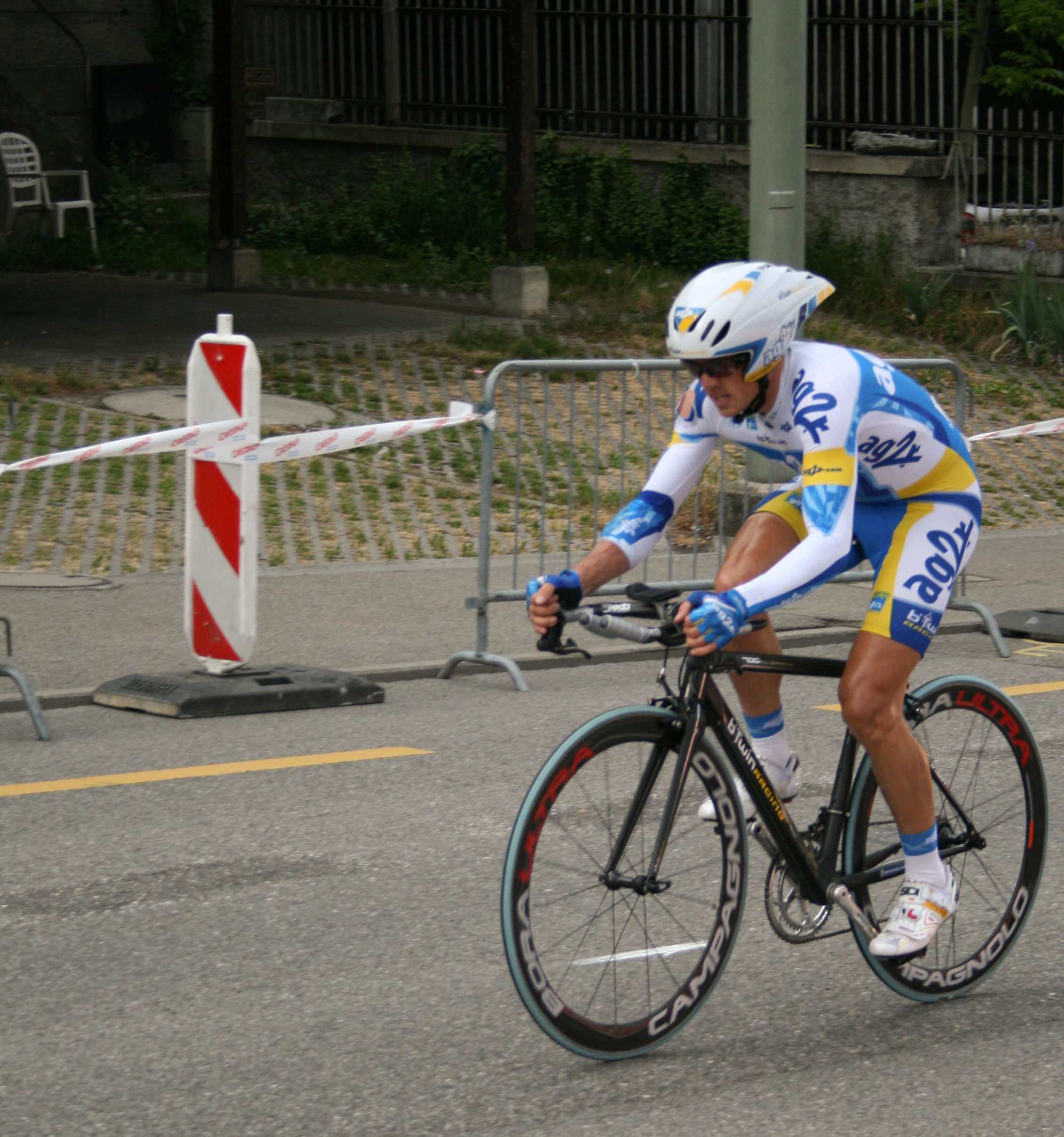 Simon Gerrans prologue du Tour de Romandie 2007